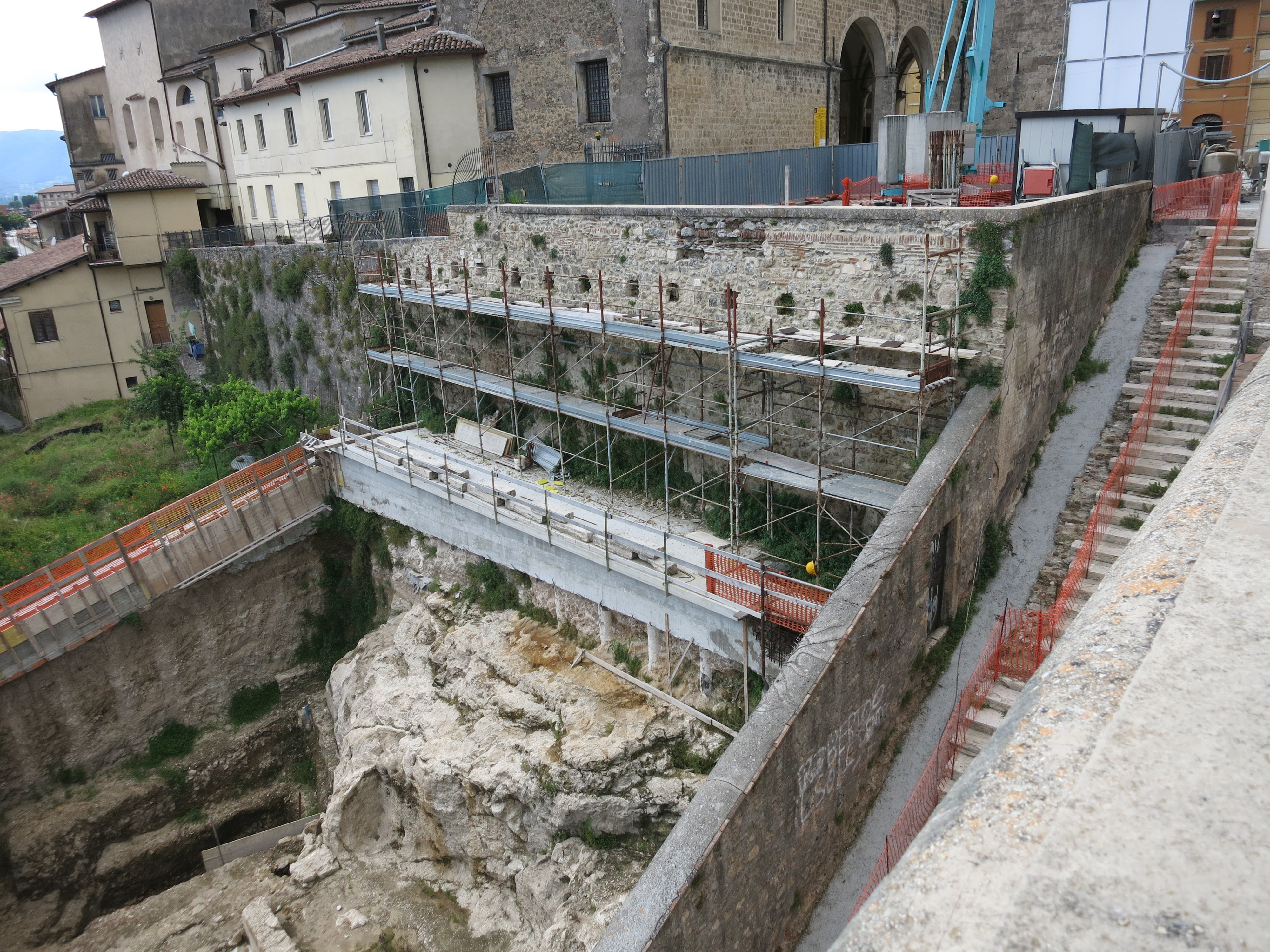 Lavori per la costruzione di un ascensore a Rieti (Lazio) che collegherà via San Pietro Martire (dove si trova la biblioteca e il museo archeologico) con Piazza Cesare Battisti (dove si trova il Duomo). Nel cantiere sono stati ritrovati resti della cinta muraria di epoca romana. Foto scattata dai giardini del Vignola.